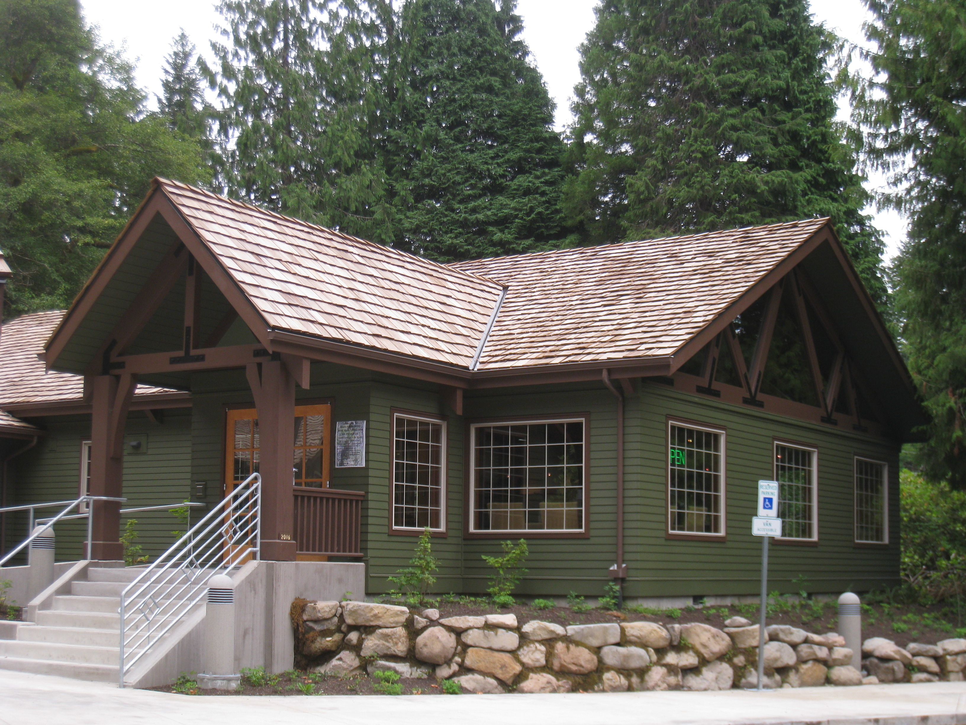 Zigzag Ranger Station-Mt Hood